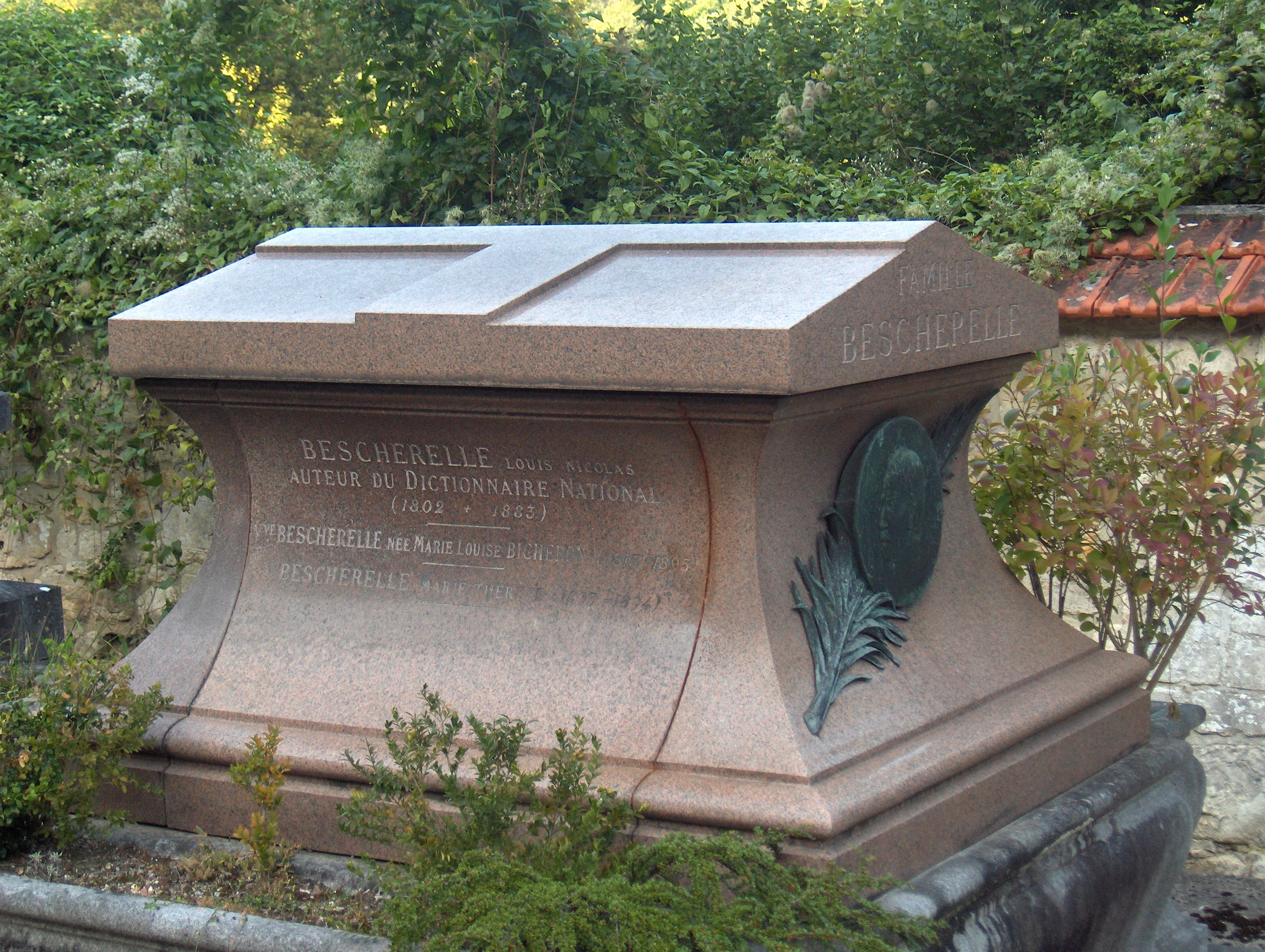 Tombeau de Louis-Nicolas Bescherelle (1802-1883) à Valmondois (Val-d'Oise) orné d'un médaillon d'Adolphe-Victor Geoffroy-Dechaume